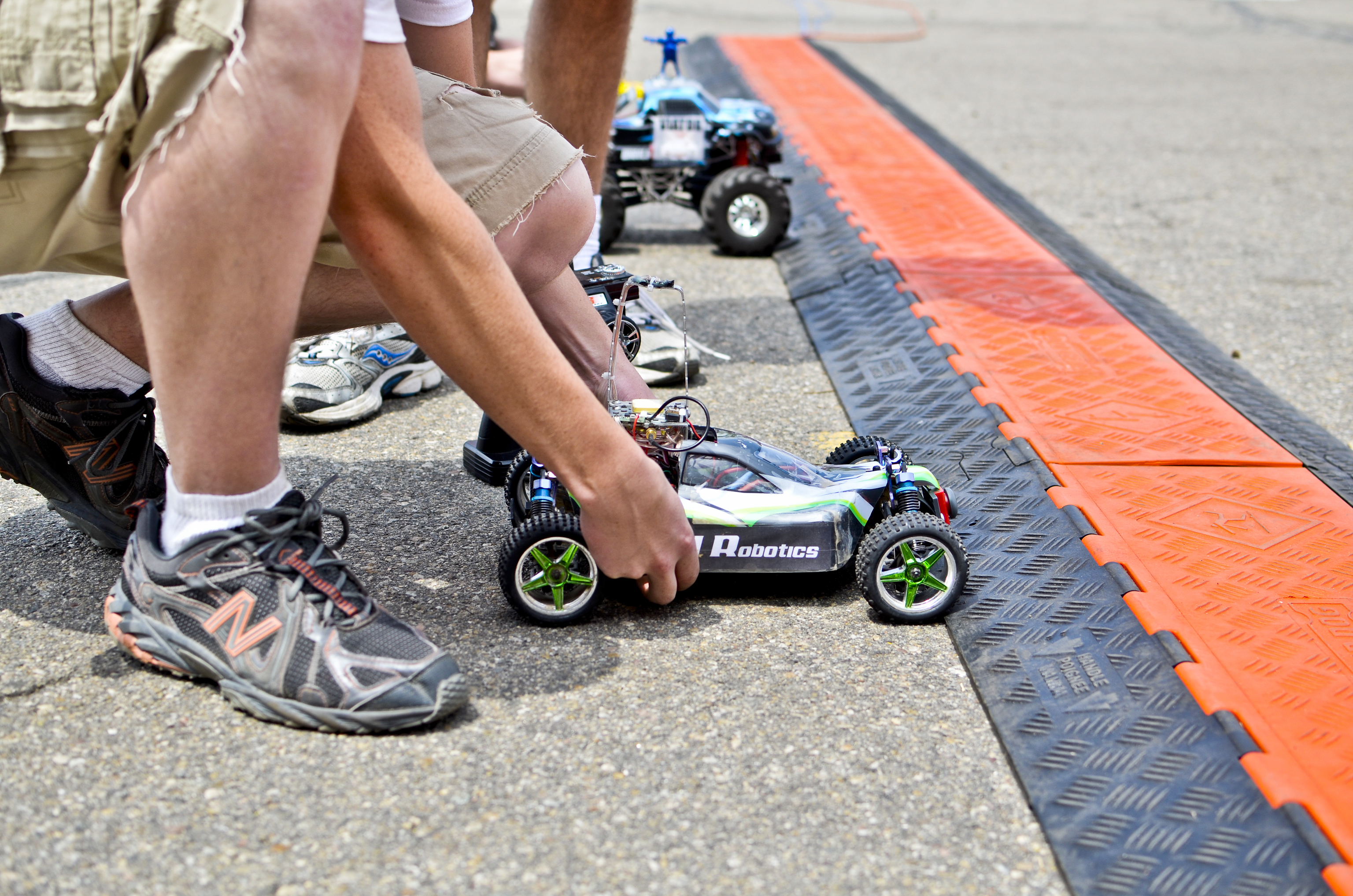 AVC 2012